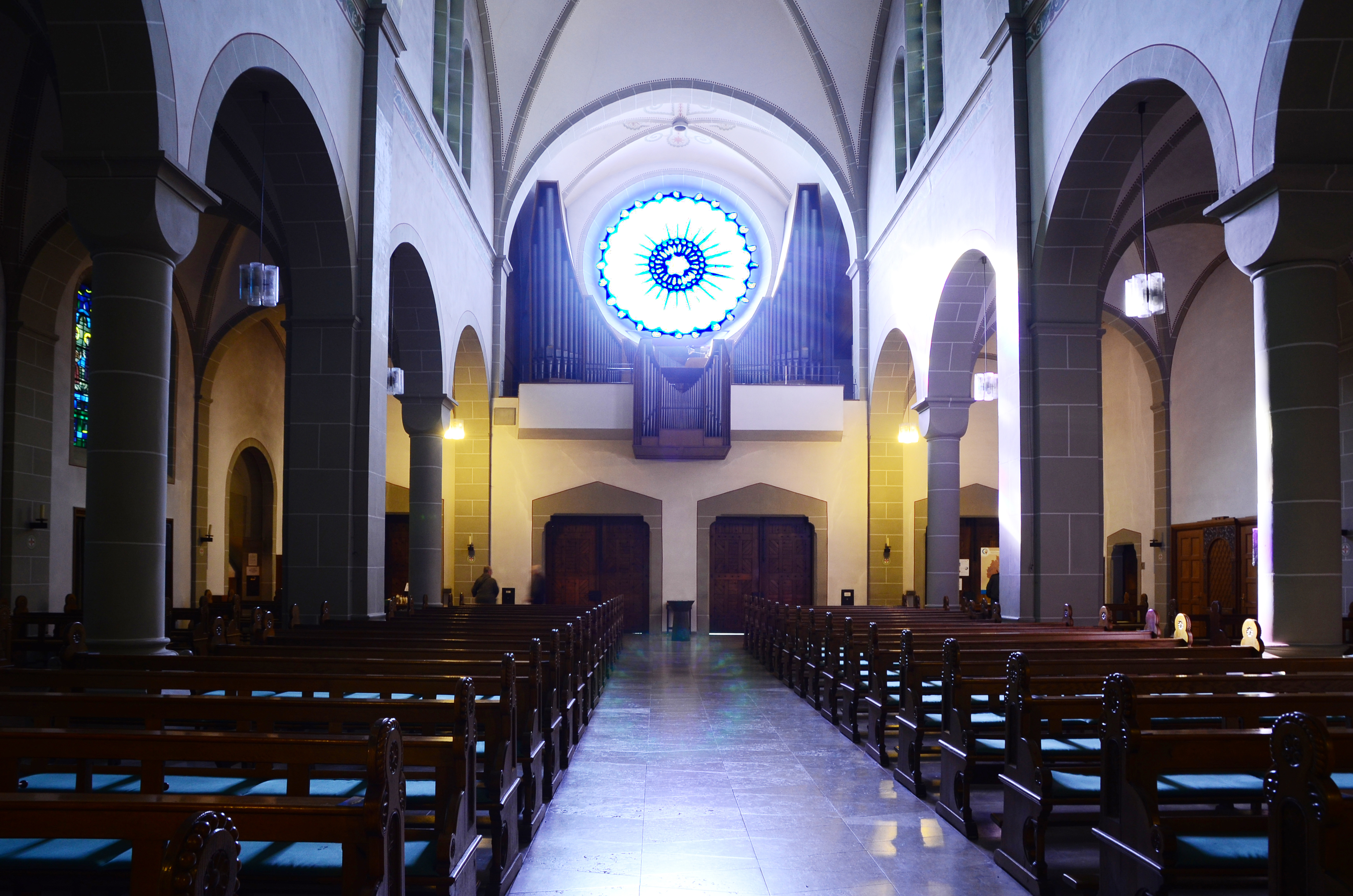 Denkmalgeschützte Basilika Mariä Heimsuchung (Werl), Blick durch das Kirchenschiff auf die Orgel